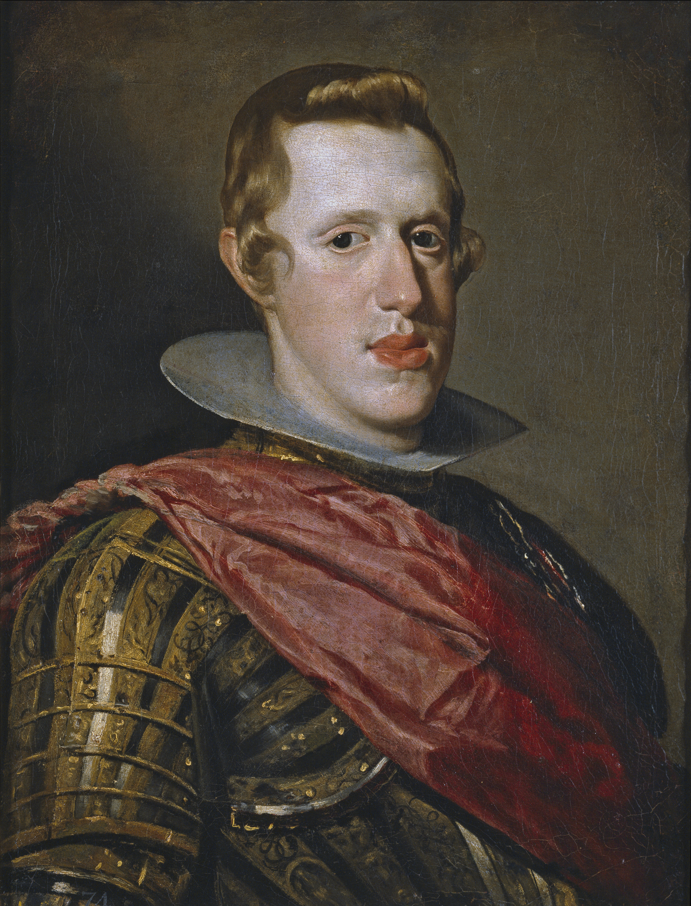 Retrato del rey Felipe IV de España (1601-1665), que fue hijo del rey Felipe III de España y de la reina Margarita de Austria.